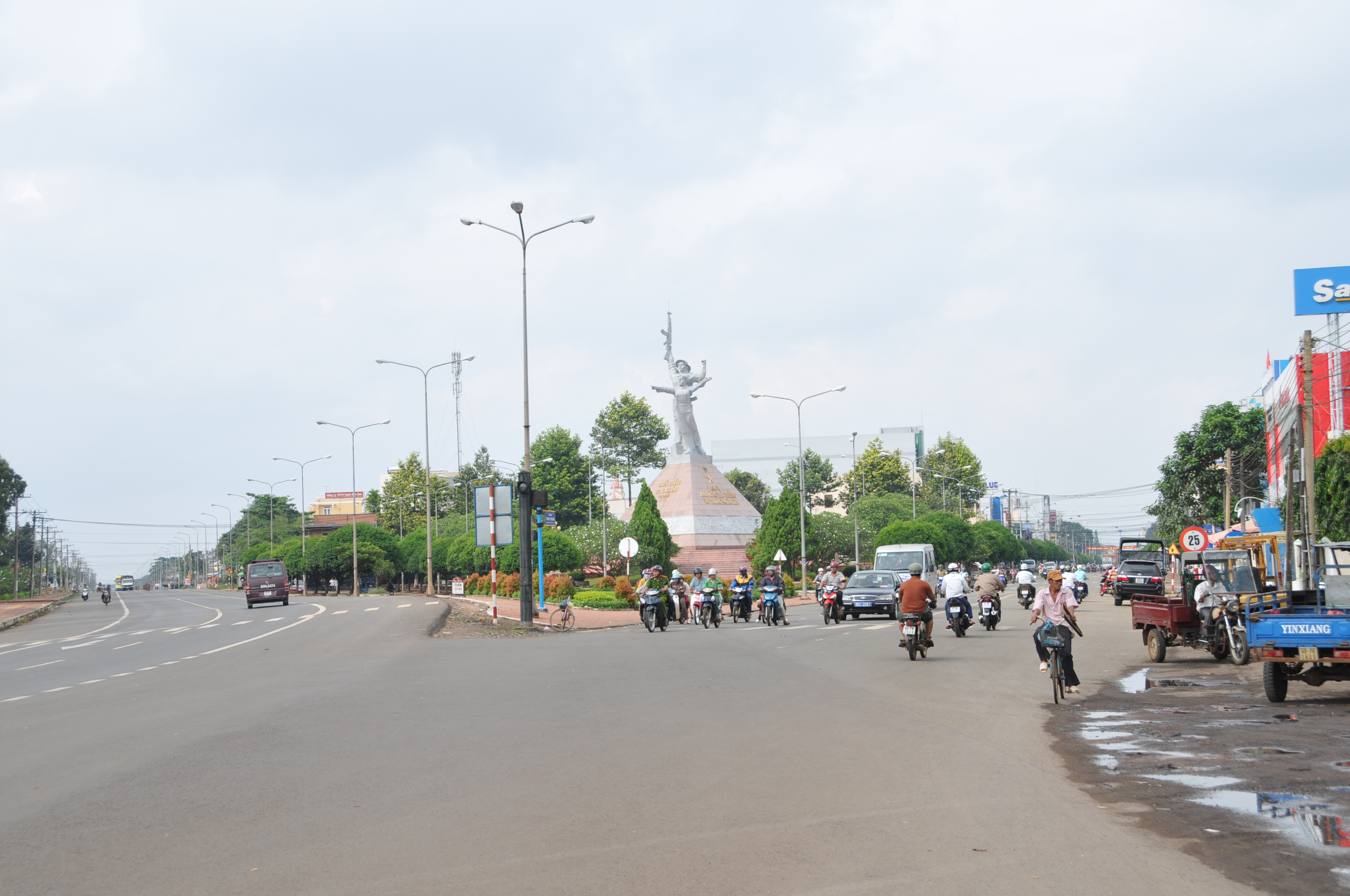 Tượng đài Long Khánh